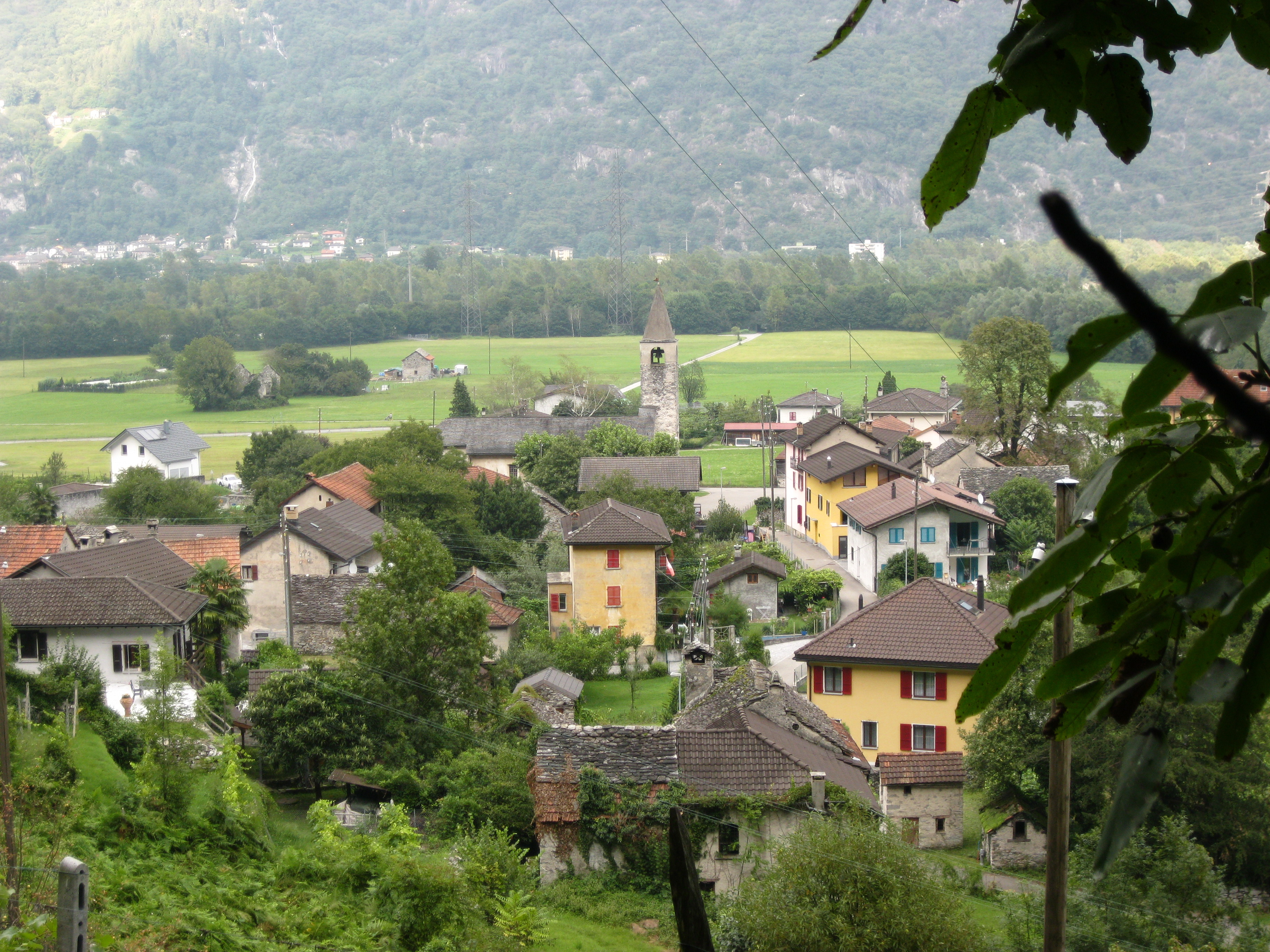 Moleno di giorno